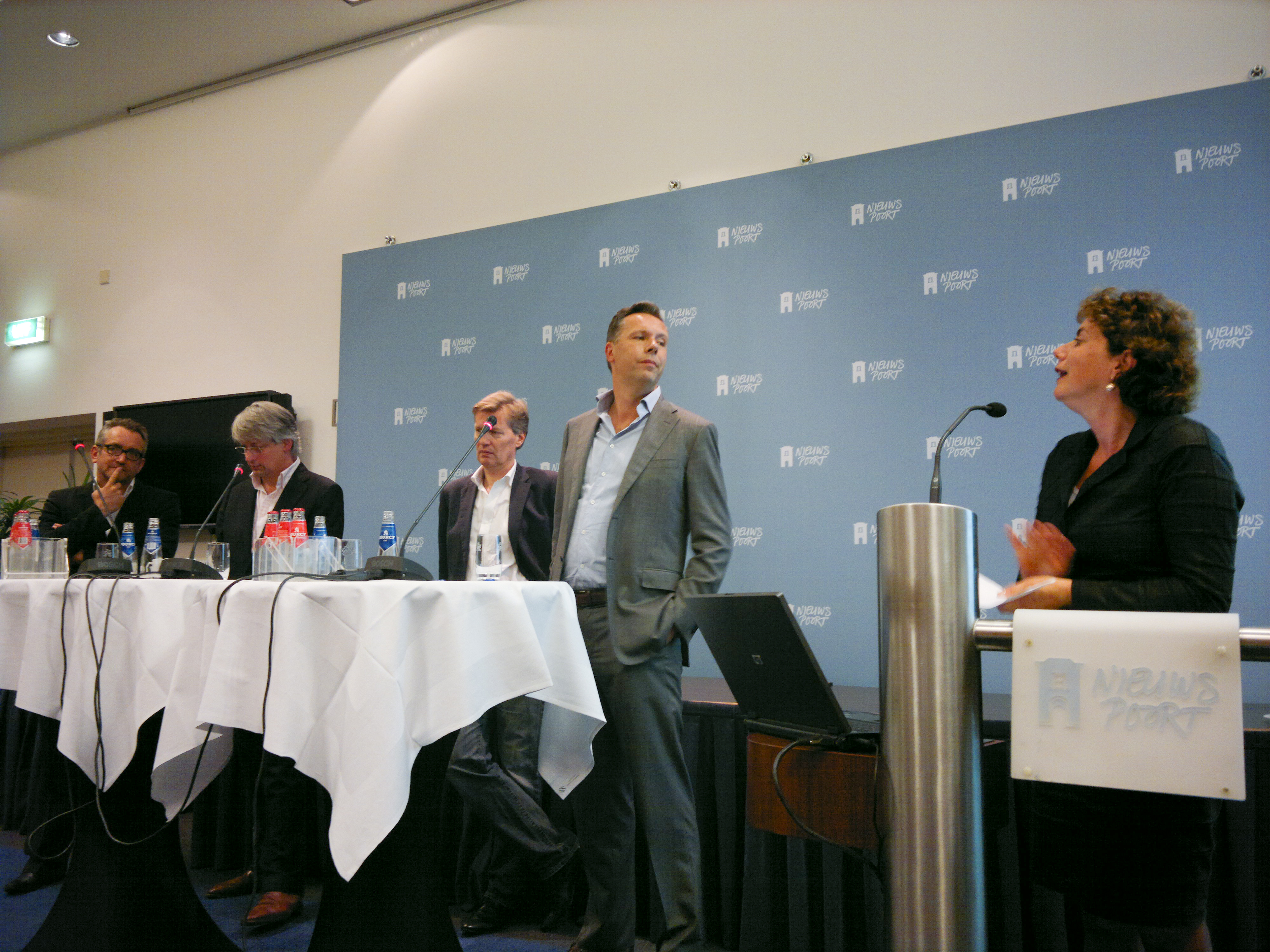 Peter Vandermeersch (NRC Handelsblad) - Marcel Gelauff (NOS Nieuws) - Frank Poorthuis (HP De Tijd) - Philippe Remarque (de Volkskrant) verslag